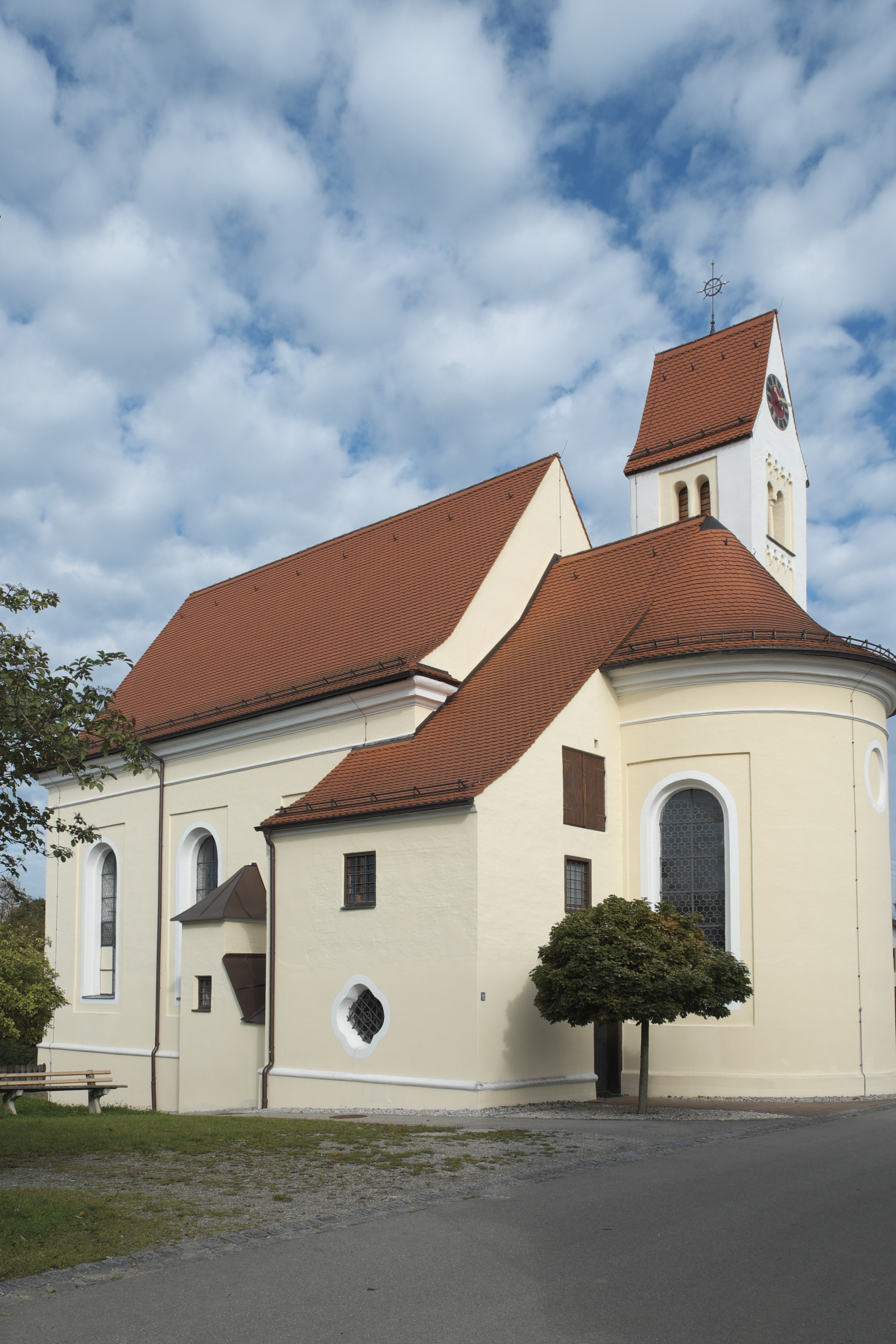 Katholische Pfarrkirche Zur Schmerzhaften Muttergottes in Waalhaupten (Waal) im Landkreis Ostallgäu (Bayern/Deutschland)